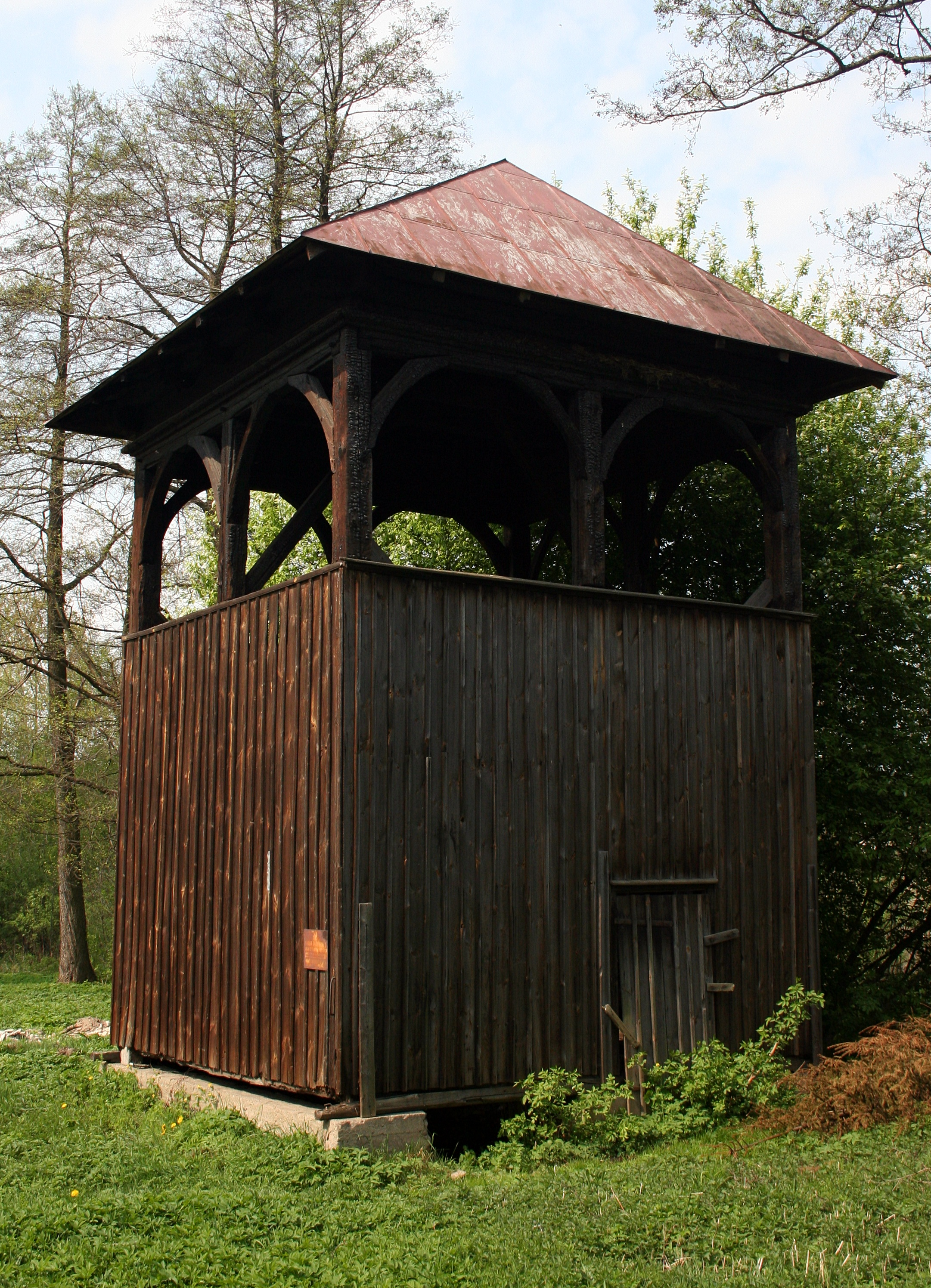 Zabytkowa dzwonnica przy kościele św. Stanisława w Białej Górnej